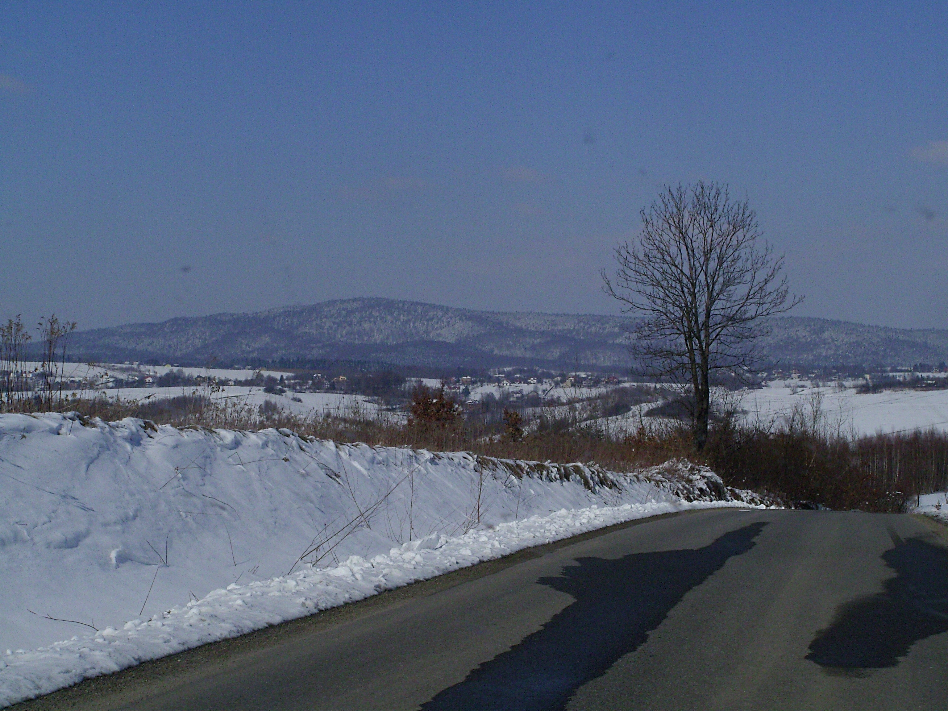 Widok na Bączal Górny w oddali góra Liwocz